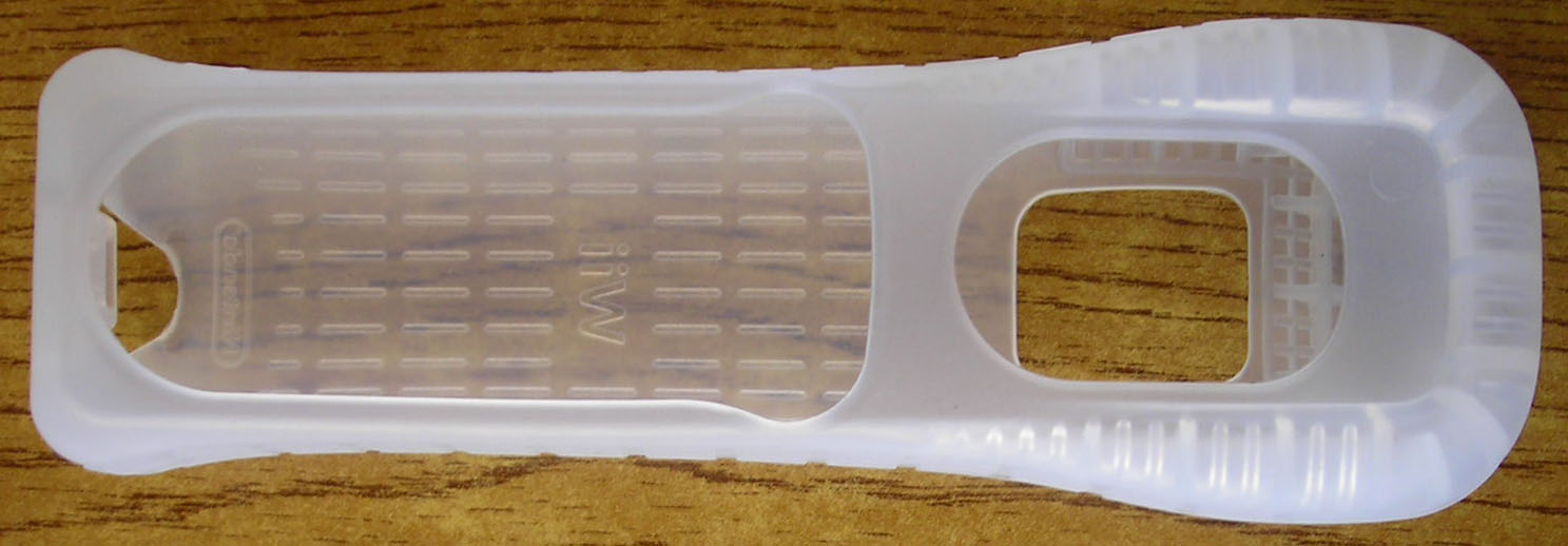 Guscio protettivo del Wii Remote